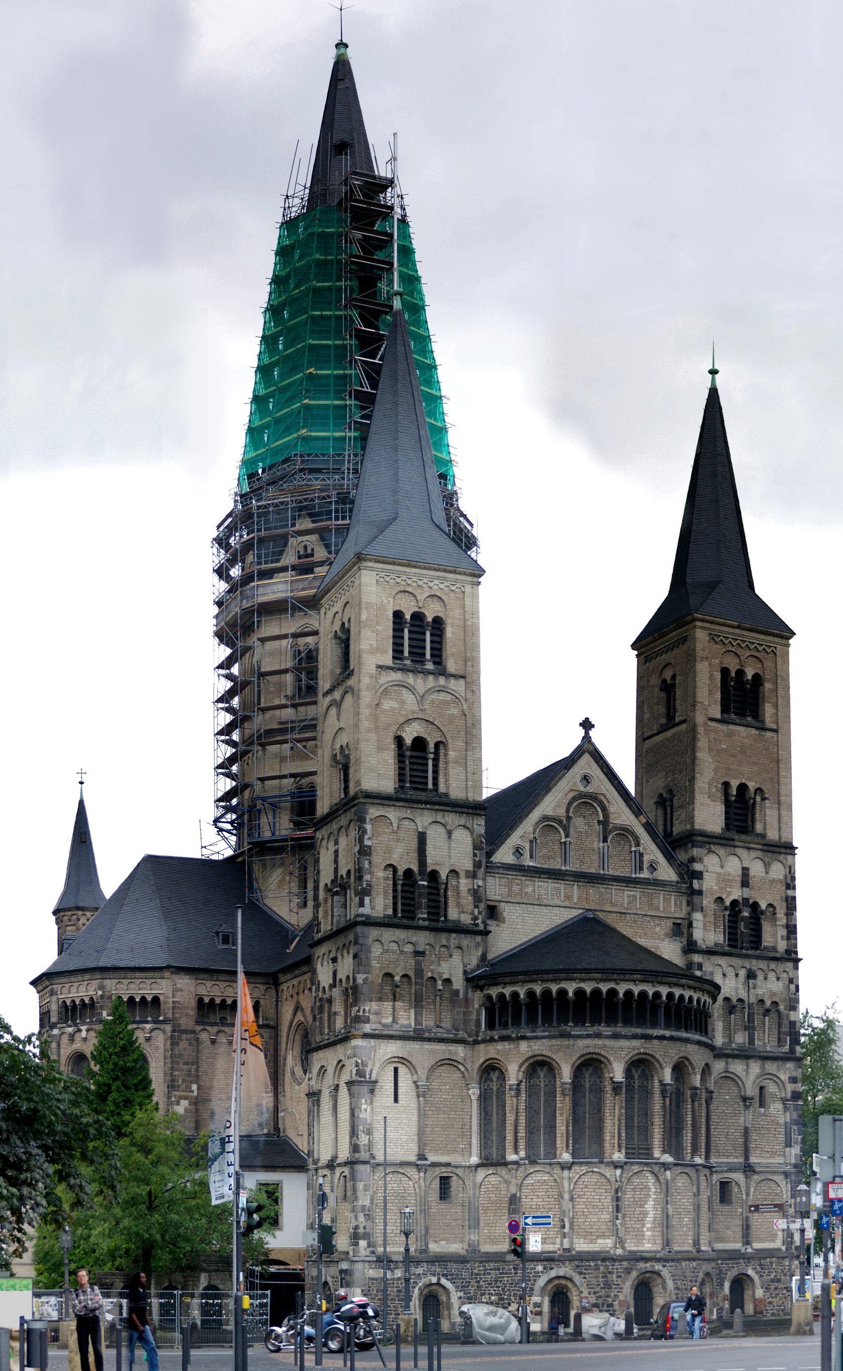 Bonner Münster This panoramic image was created with Autostitch (stitched images may differ from reality).